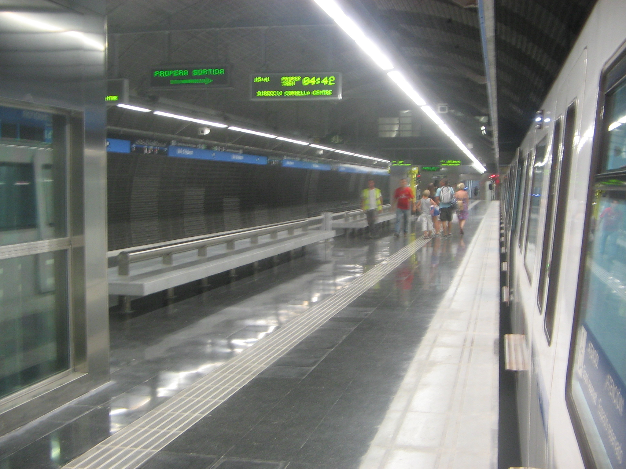 L5 Vall d'Hebron